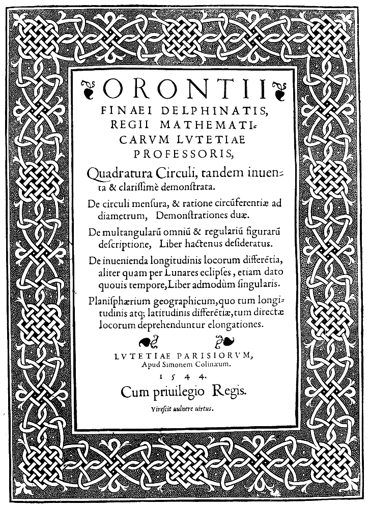 Frontespizio